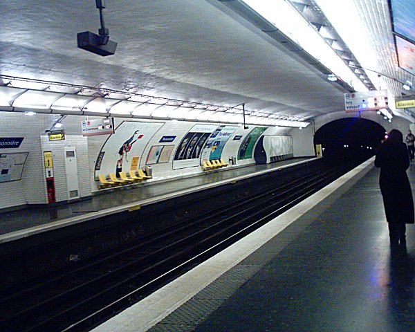 Station Poissonnière du Métropolitain de Paris.